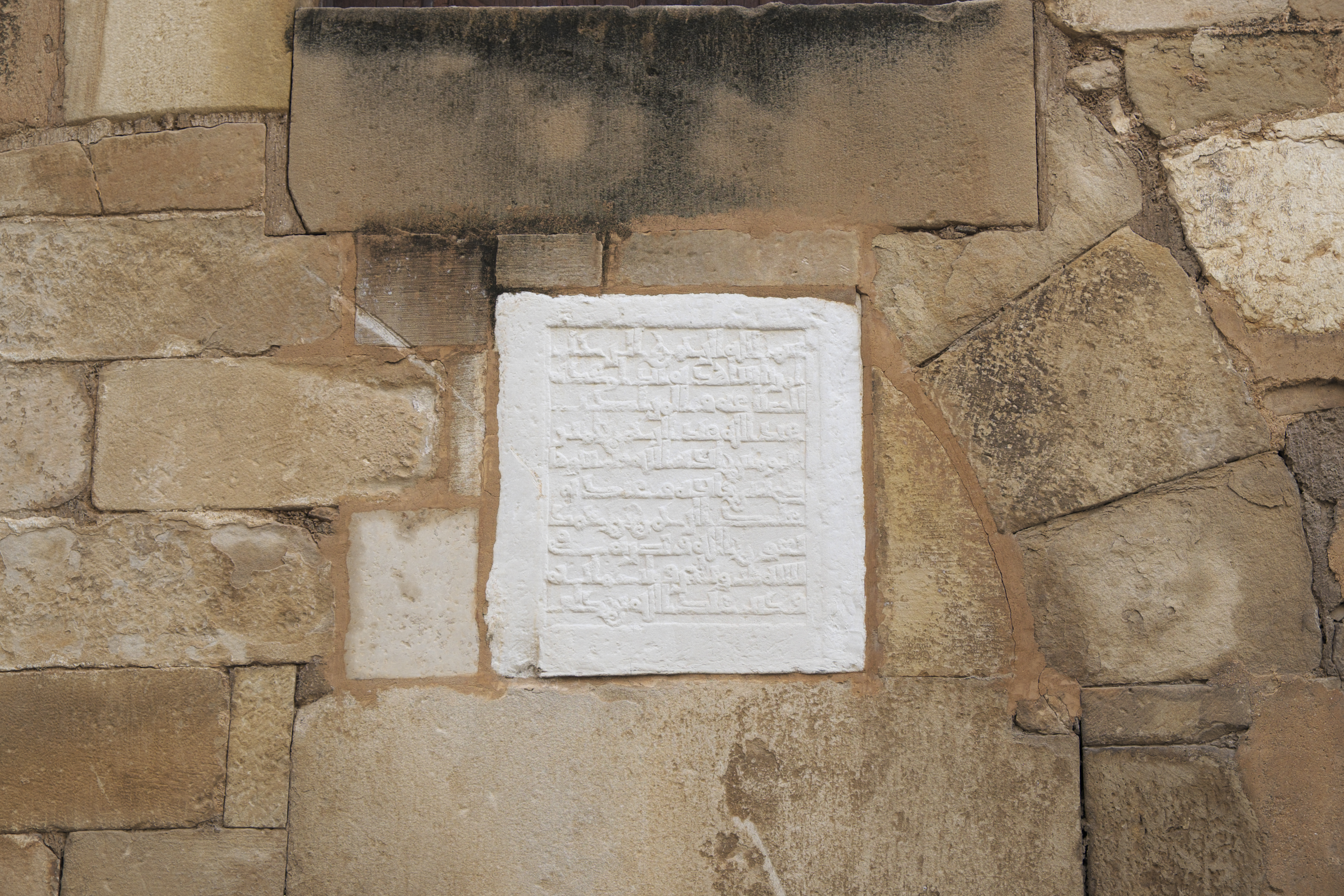 Stein mit arabischer Inschrift in einem Gebäude beim Portal del Romeu in Tortosa in der Provinz Tarragona (Katalonien/Spanien), in der Straße Carrer la Suda; Kopie des Gründungssteines der Werft (Atarazanas), dessen Original aus dem 10. Jahrhundert stammt und im Kathedralmuseum in Tortosa aufbewahrt wird